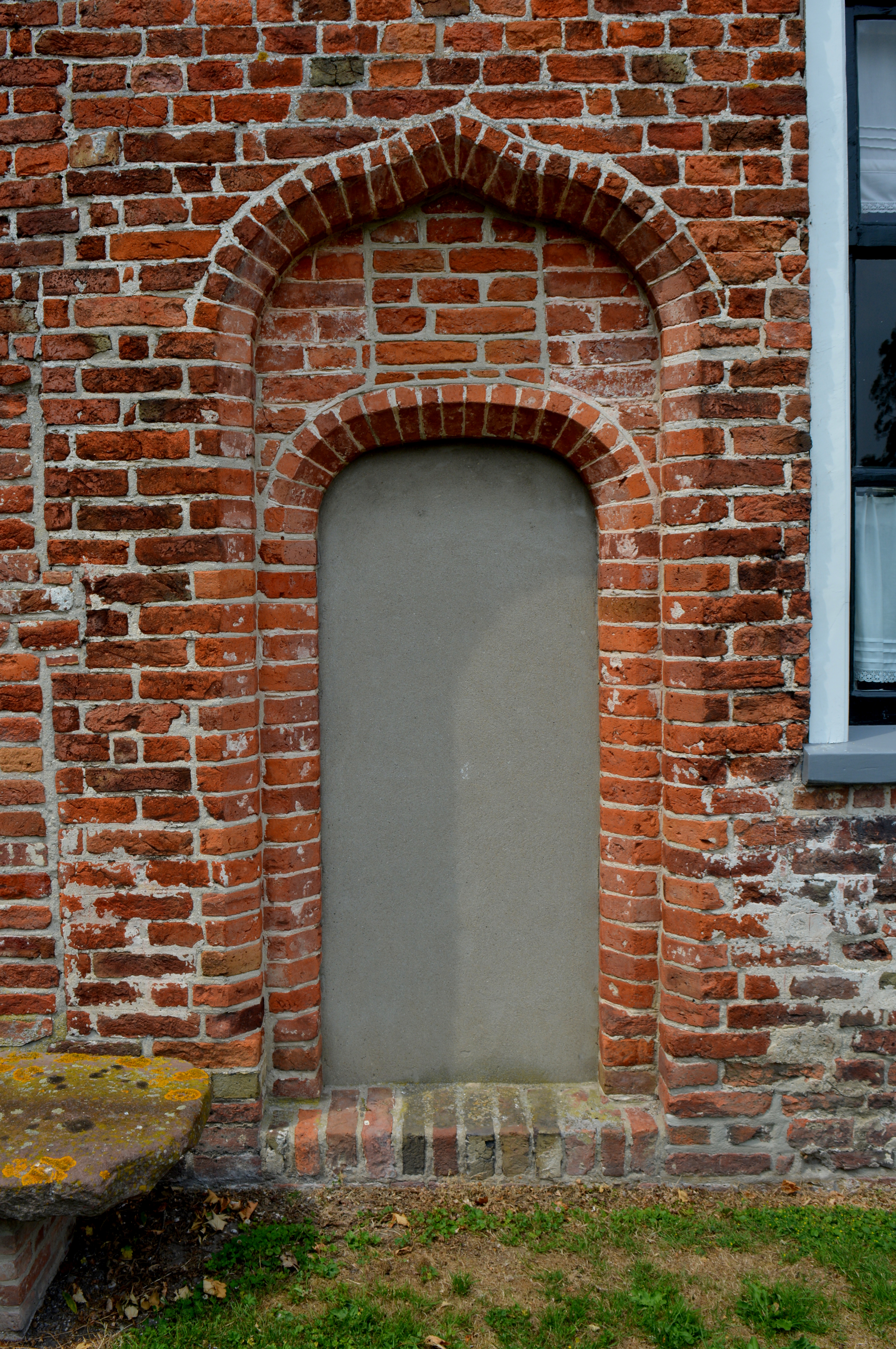 Gerkesklooster, hervormde kerk, kielboogpoortje